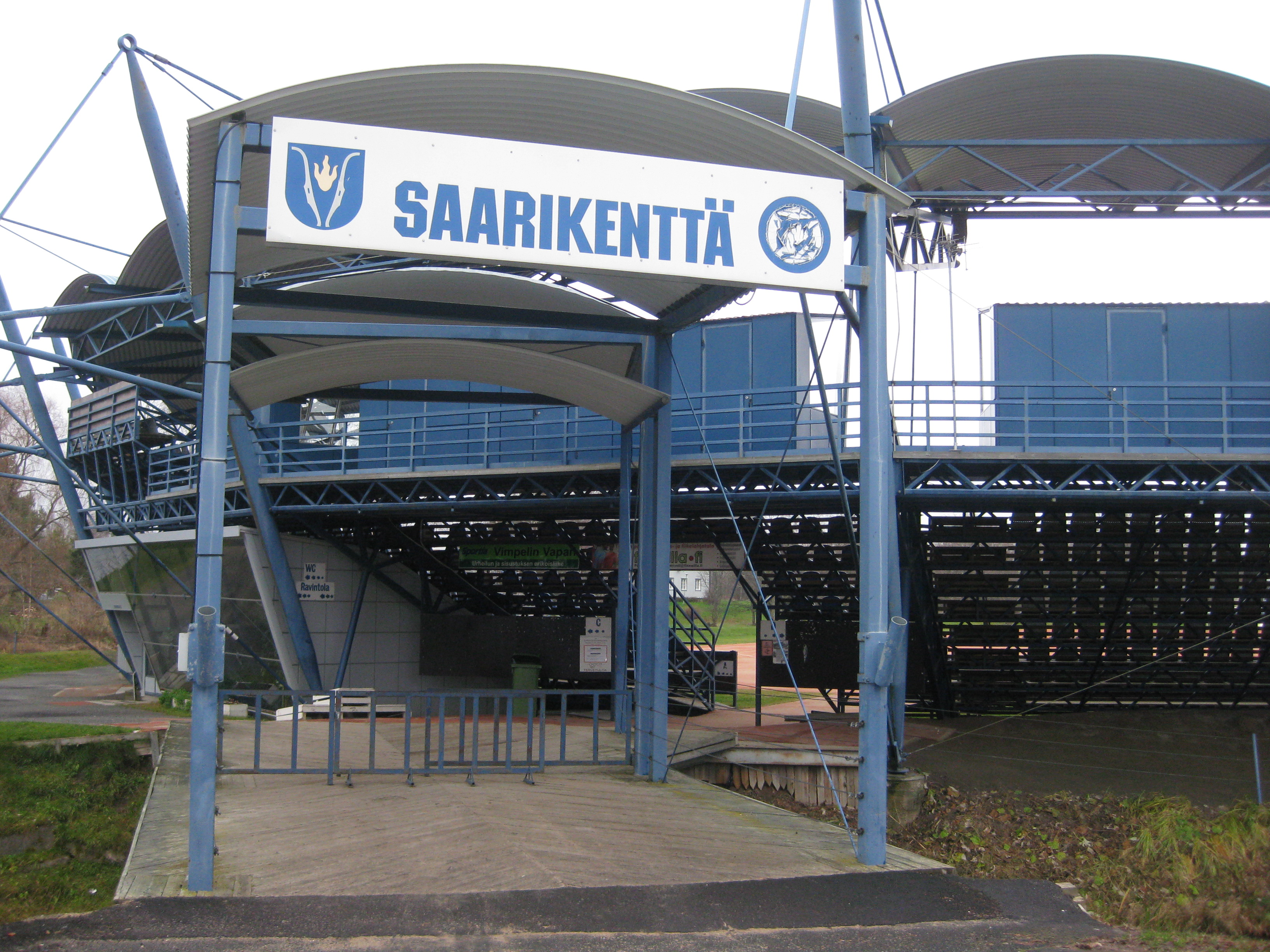 Saarikenttä